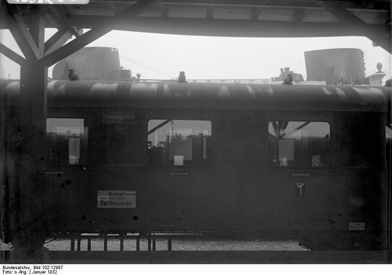 Umsteigen nach New York ! Der Columbus-Bahnhof der Reichsbahn in Bremerhaven ist der modernste Umsteigebahnhof vom Eisenbahnzug zum Ozeandampfer. Im Hintergrund des D-Zugwagens sieht man deutlich die Schiffsschornsteine des im Hafen wartenden Schiffes.